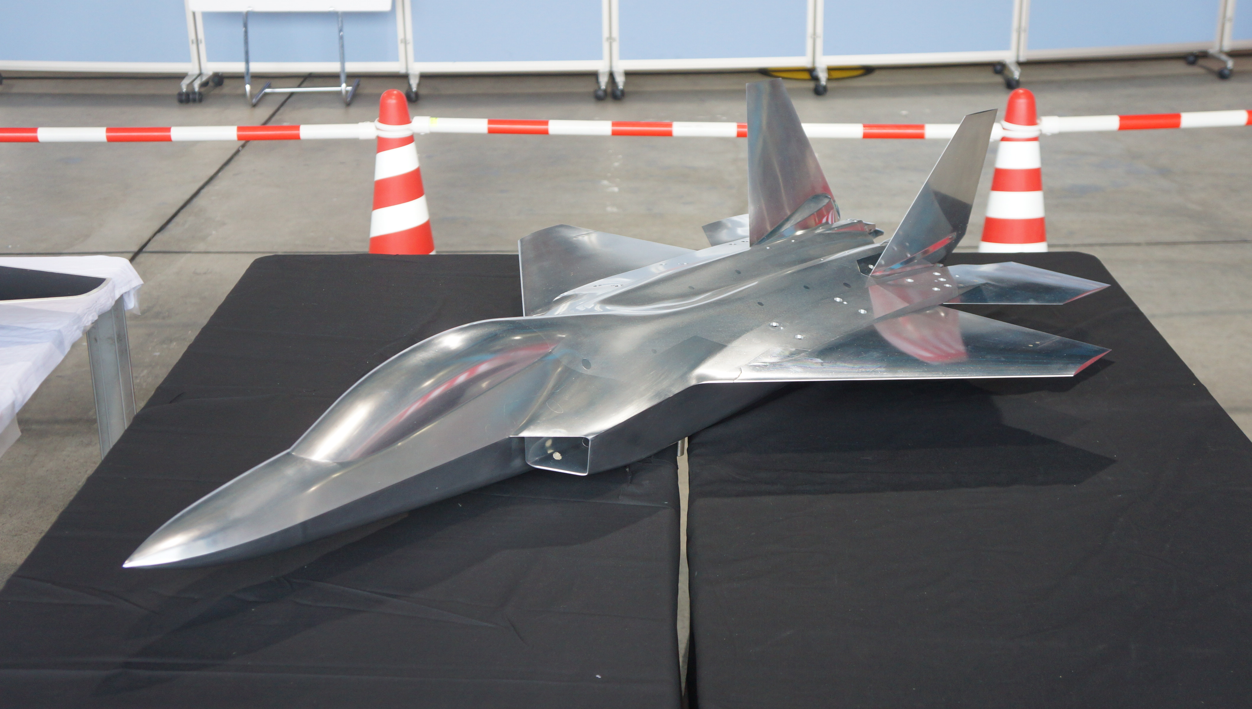 先進技術実証機”心神”風洞試験用1/10スケールモデル 12年10月28日 航空自衛隊岐阜基地にて